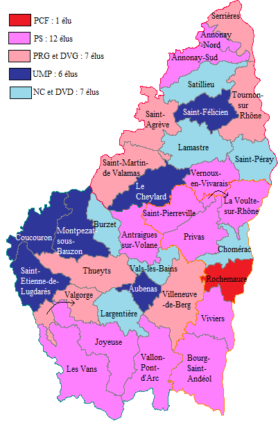 Couleurs politiques des différents cantons de l'Ardèche